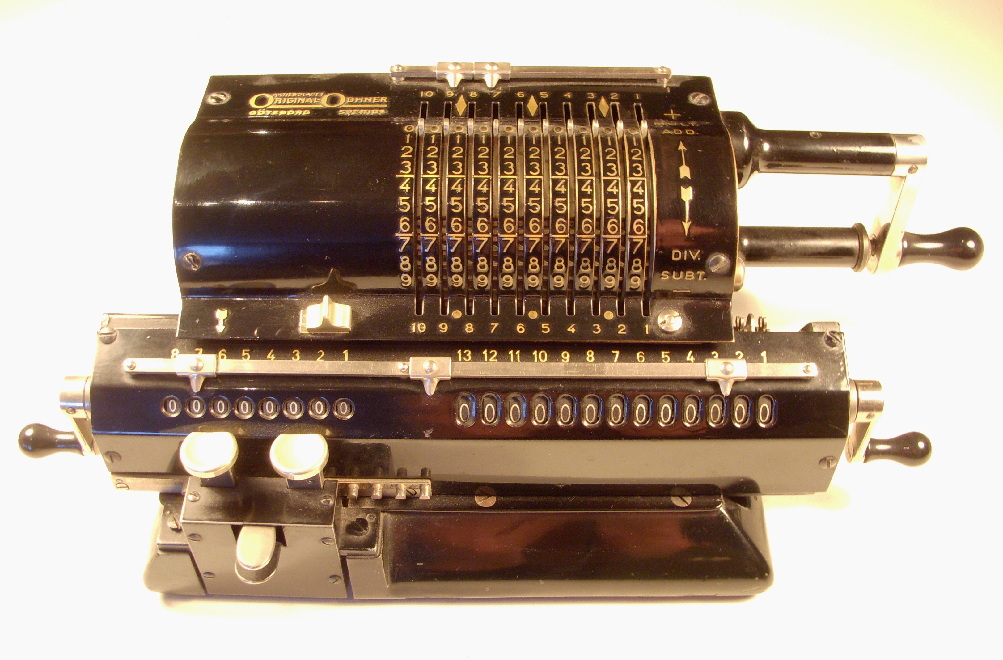 "Original Odhner" räkenkalkylator från 1935